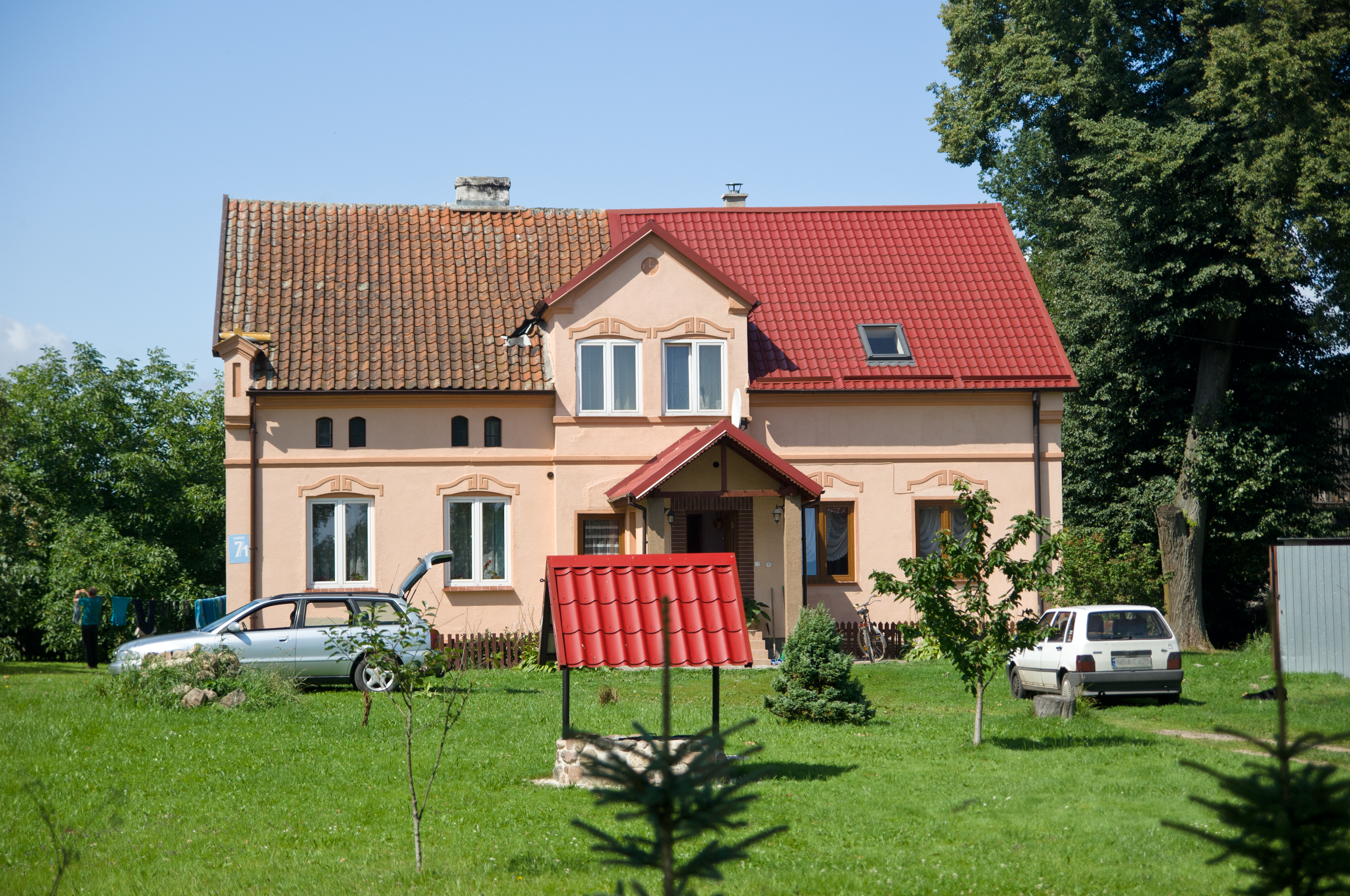 Dom nr 7/1 w Janikowie (województwo warmińsko-mazurskie).